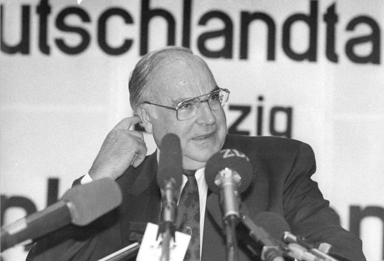 Leipzig, Deutschlandtag JU, Helmut Kohl ADN-Grubitzsch 16.9.90- Leipzig: Bundeskanzler Helmut Kohl hat in Leipzig-Markleeberg seine Überzeugung bekräftigt, daß es kein Zurück zum deutschen Nationalstaat geben werde. Kohl sprach auf dem Deutschlandtag 1990 der Jungen Union. Abgebildete Personen: Kohl, Helmut: Bundeskanzler, Ministerpräsident von Rheinland-Pfalz, CDU, Bundesrepublik Deutschland (GND 118564595)